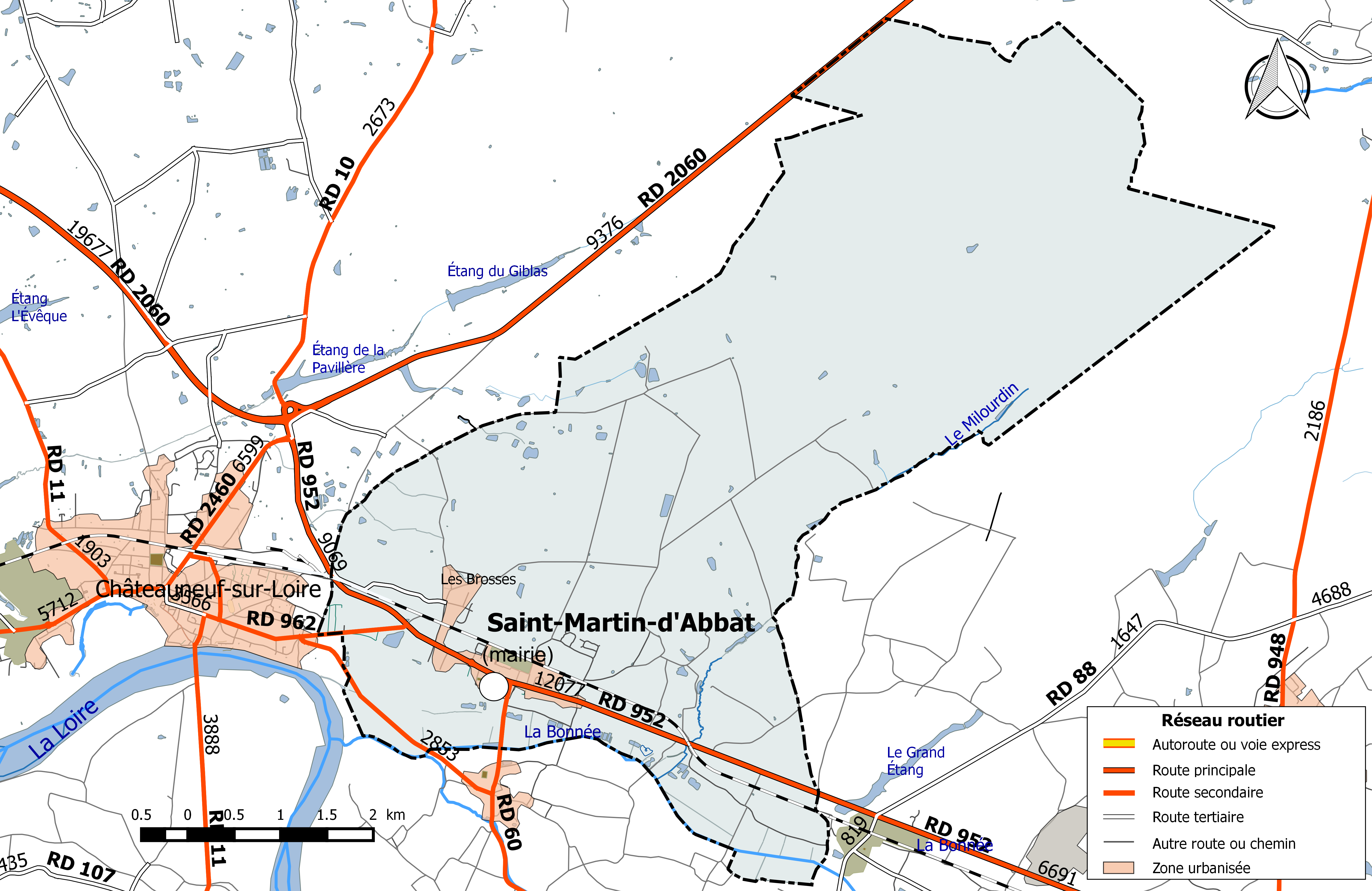 Carte du réseau routier de la commune de Saint-Martin-d'Abbat.